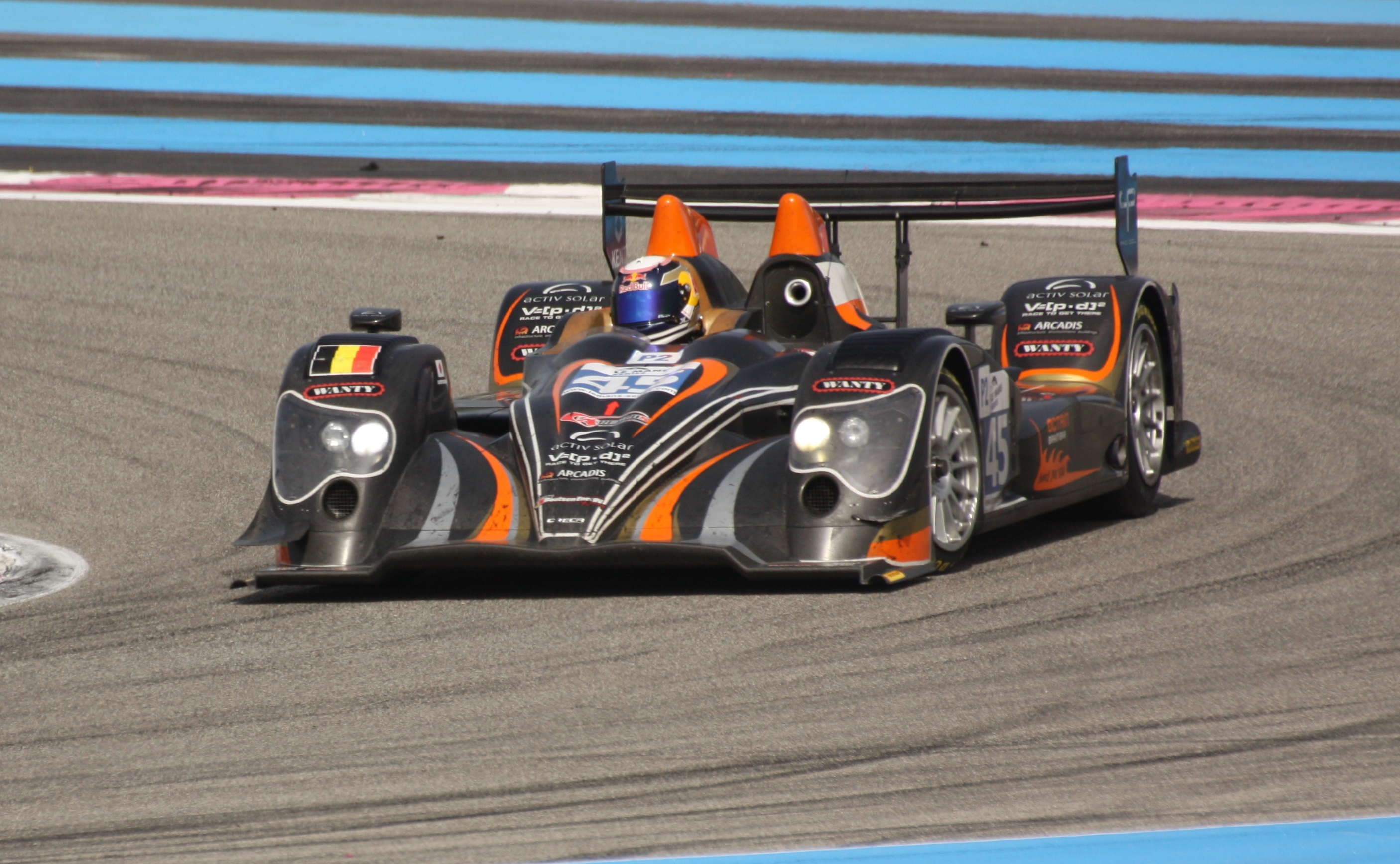 L'Oreca 03 du Boutsen Energy Racing aux 6 Heures du Castellet 2011